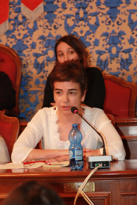 Federica Montevecchi